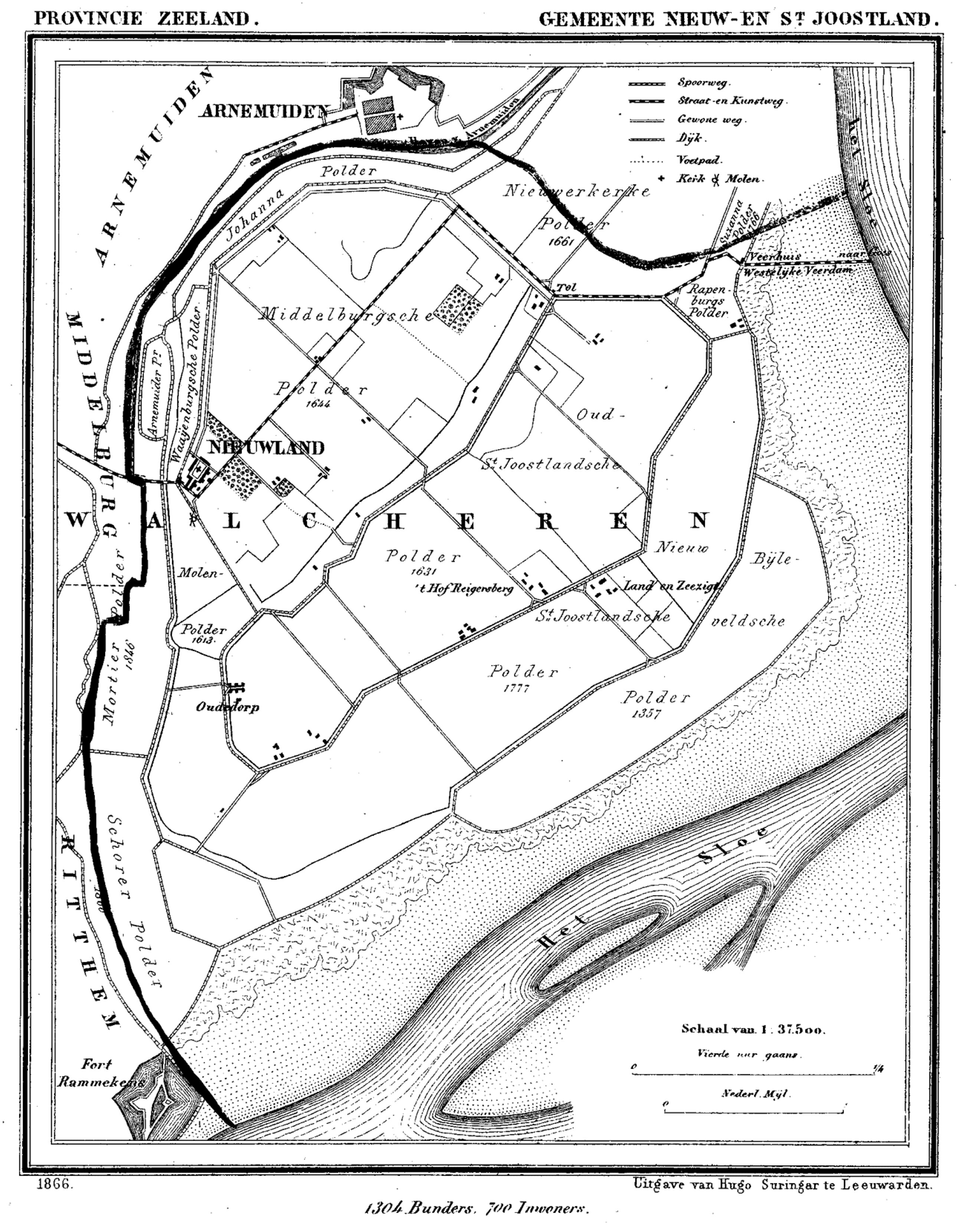 Gemeente Nieuw- en Sint-Joosland, Zeeland, Nederland